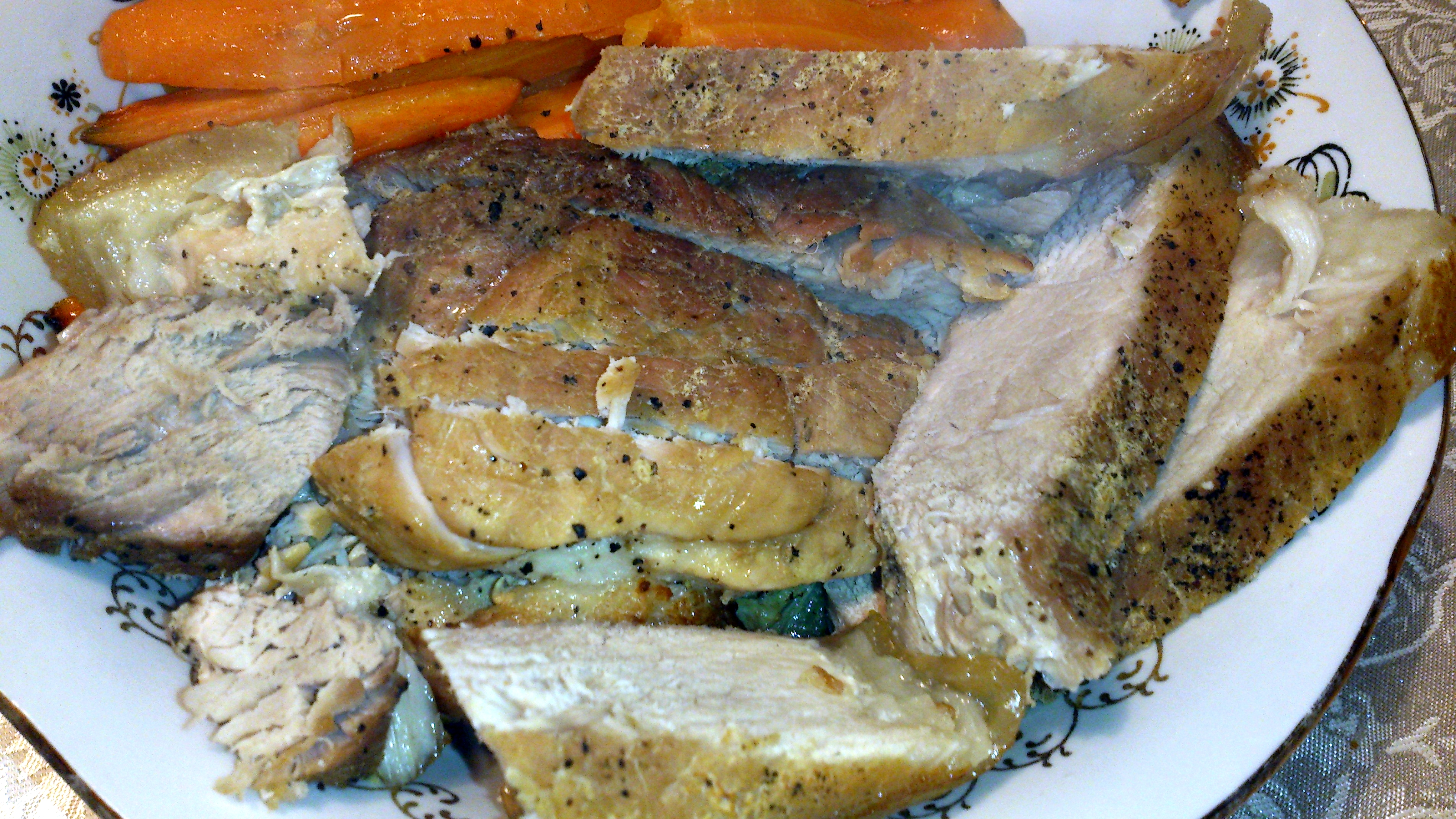 Lahtilõigatud seapraad